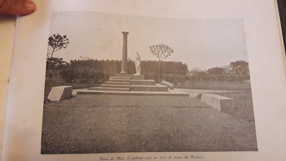 Fotografía del catálogo de estatuas adquiridas para el Parque 9 de Julio de San Miguel de Tucumán, extraída del Álbum del primer Gobierno de Miguel Campero. Año 1928.